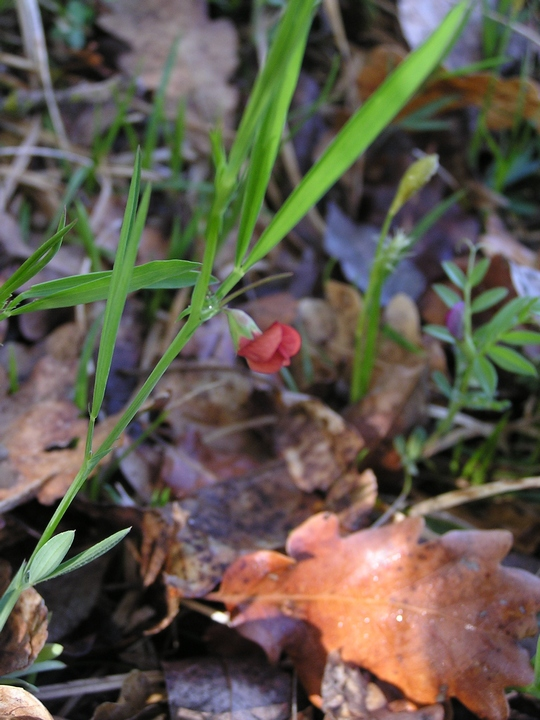 Aufgenommen in Südtirol am 22. April